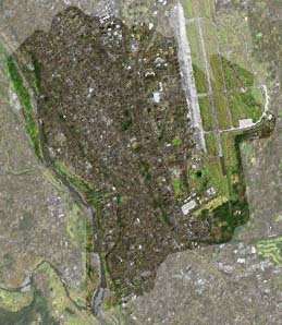 福生市ランドサット衛星画像